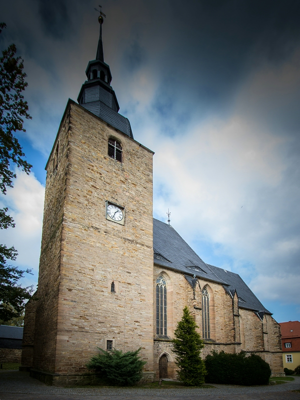 Südansicht der Stiftskirche Ebersdorf